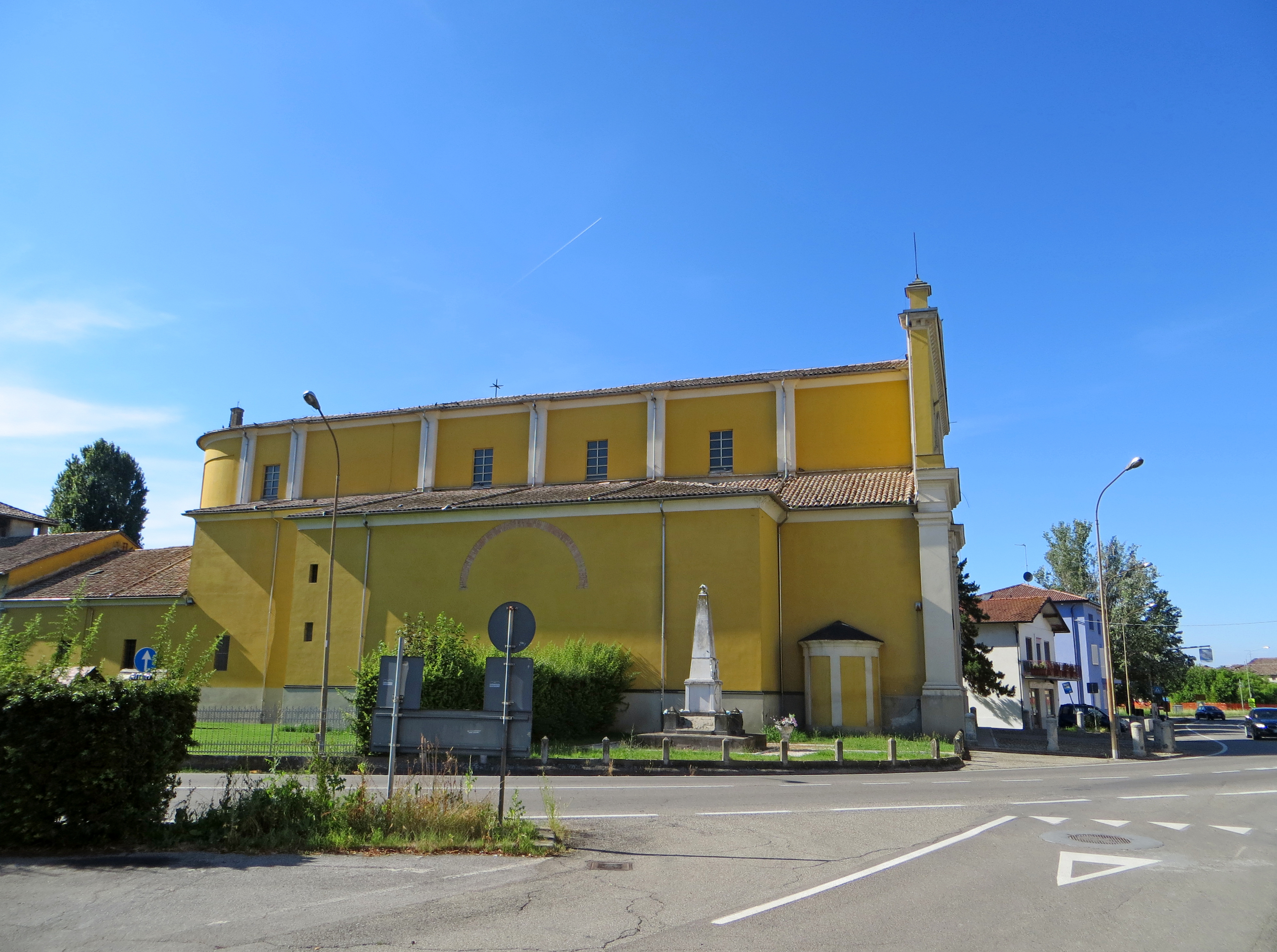 Chiesa di San Biagio (Torrile) - lato sud